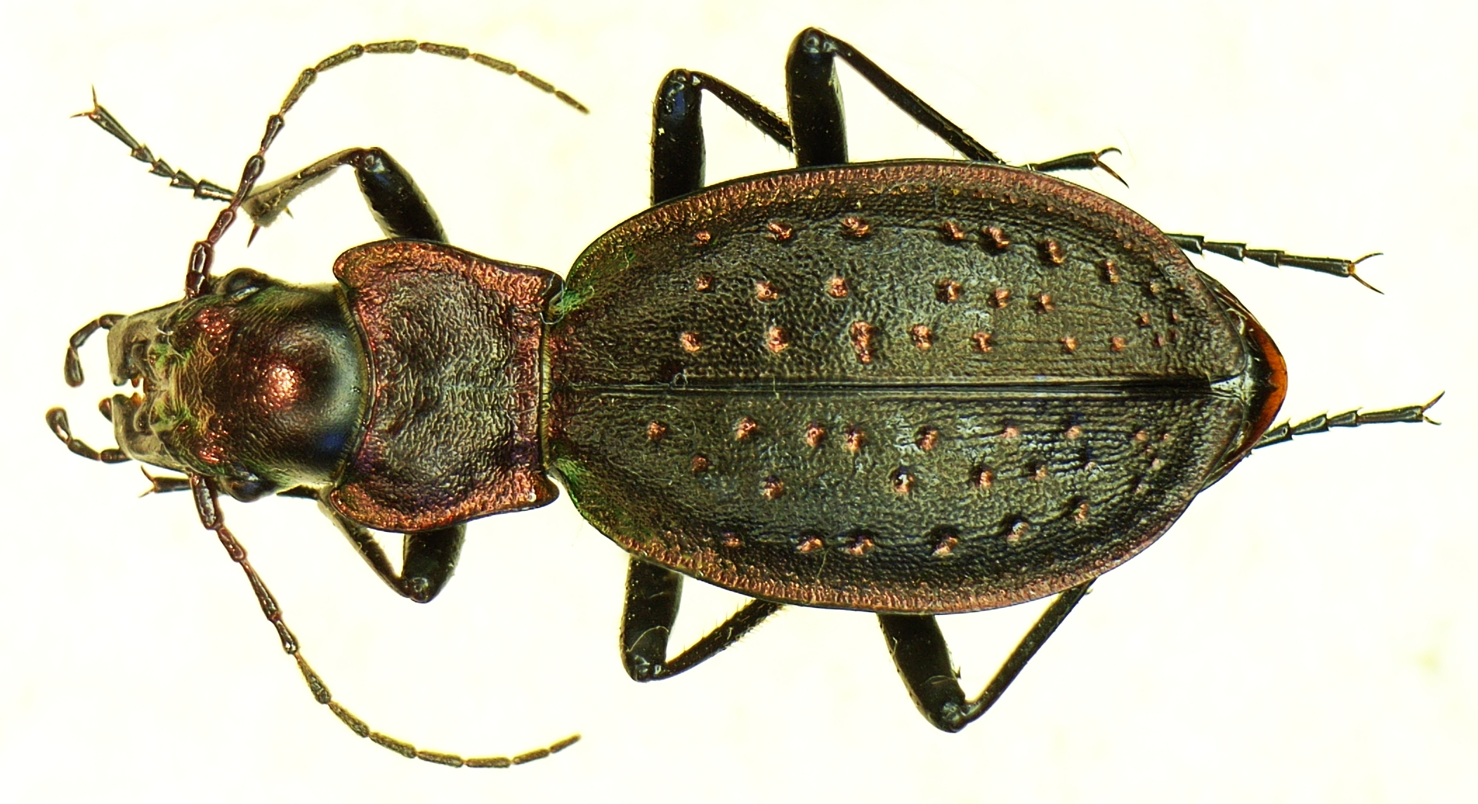 Carabus irregularis